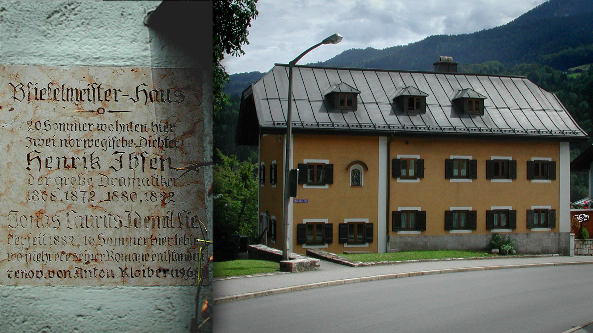 Pfieselmeister-Haus in der Bahnhofstraße 1 in Berchtesgaden mit Gedenktafel: "20 Sommer wohnten hier zwei norwegische Dichter - Henrik Ibsen, der große Dramatiker 1868, 1872, 1880, 1882 - Jonas Laurits Idemil Lie, der seit 1882 16 Sommer hier lebte, wo mehrere seiner Romane entstanden"